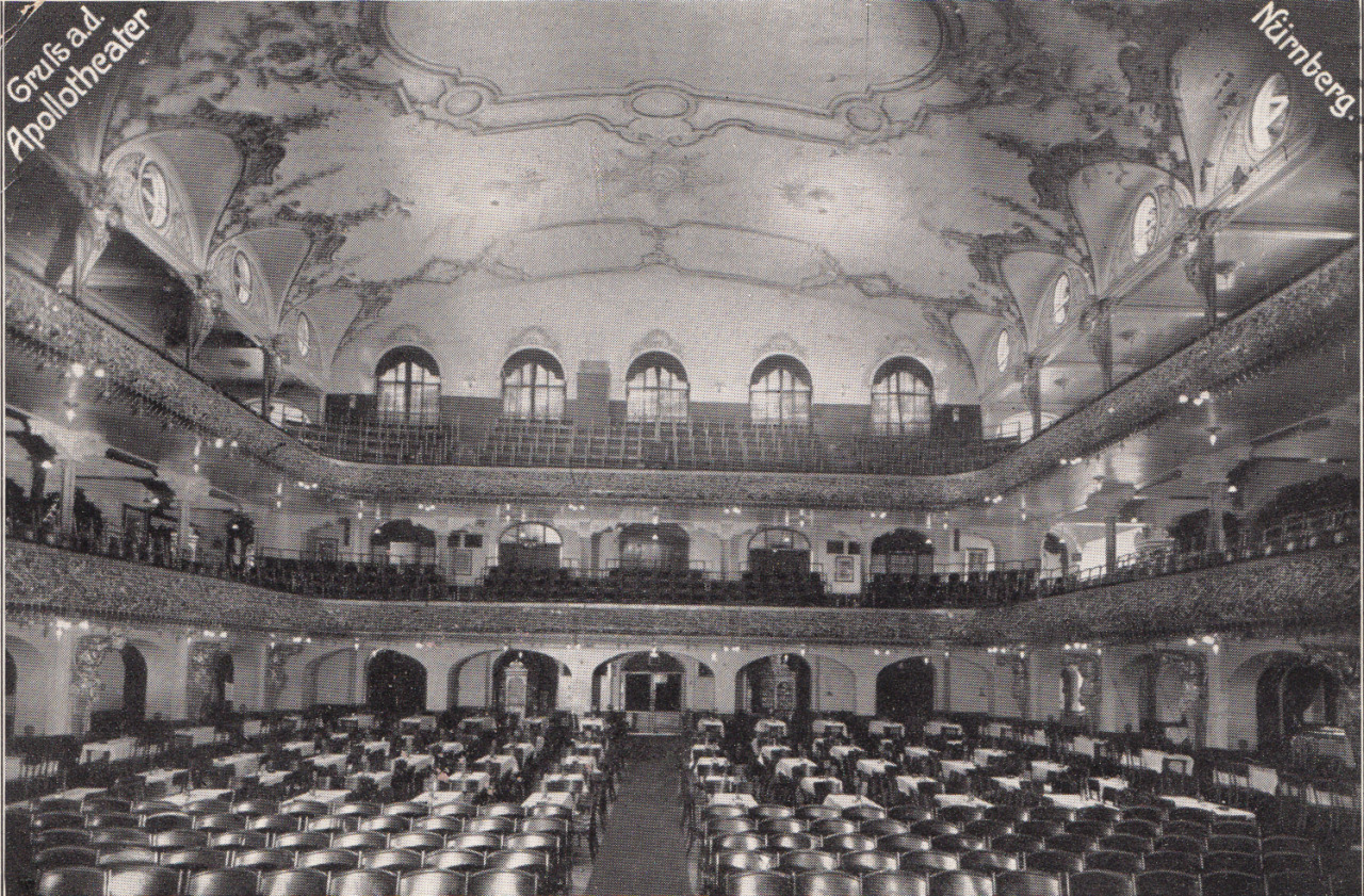 Ansichtskarte v. Apollo-Theater Nürnberg